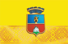 Прапор міста Васильків (районний центр в Київській області)